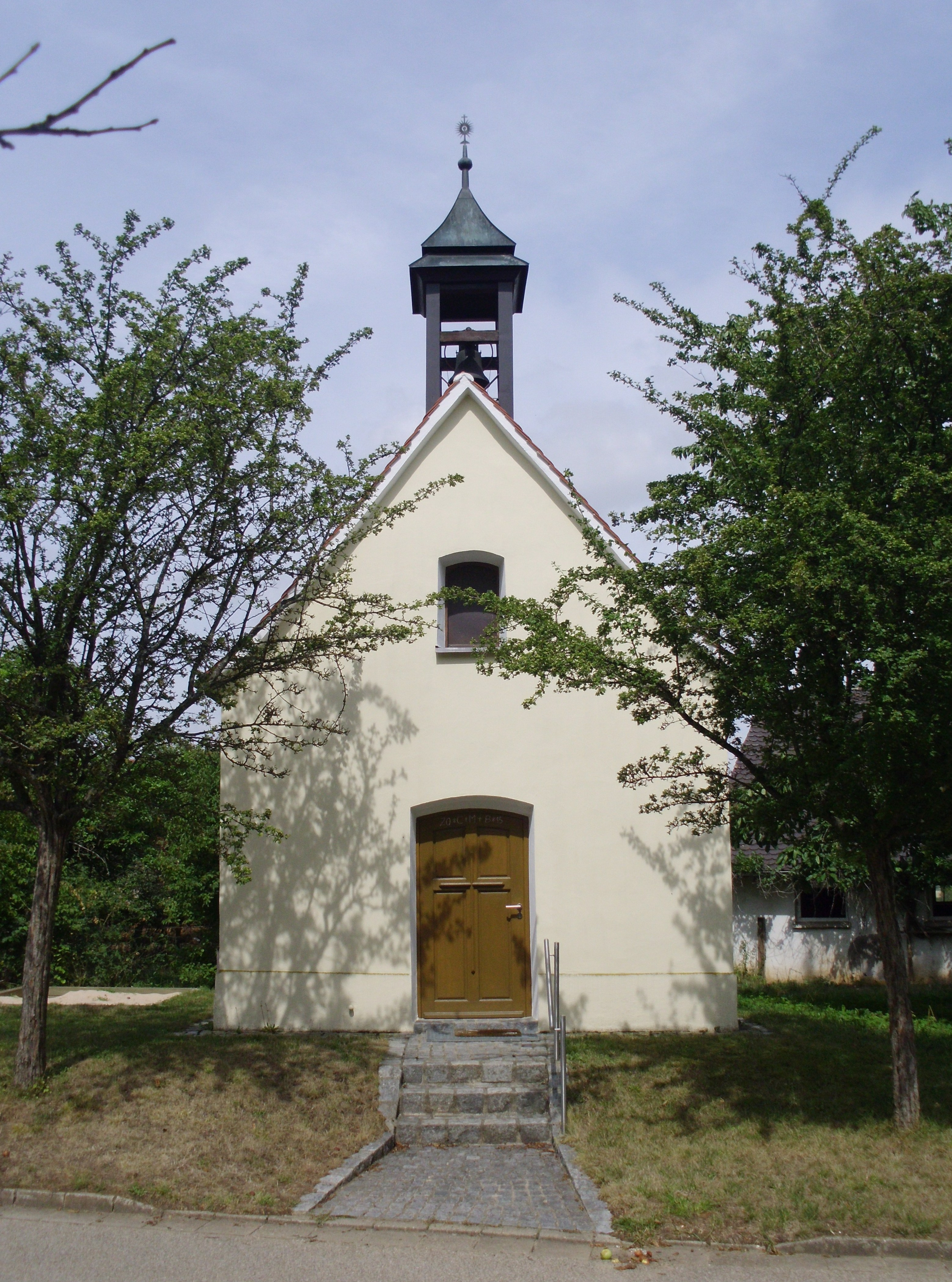 Hagenbuch, Ortsteil von Hilpoltstein im mittelfränkischen Landkreis Roth, Ortskapelle Hl. Familie